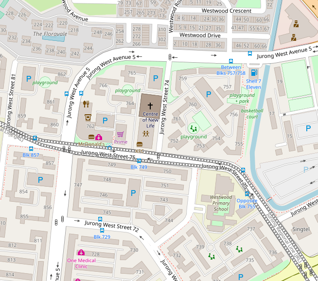 中文（新加坡）: JW1照片